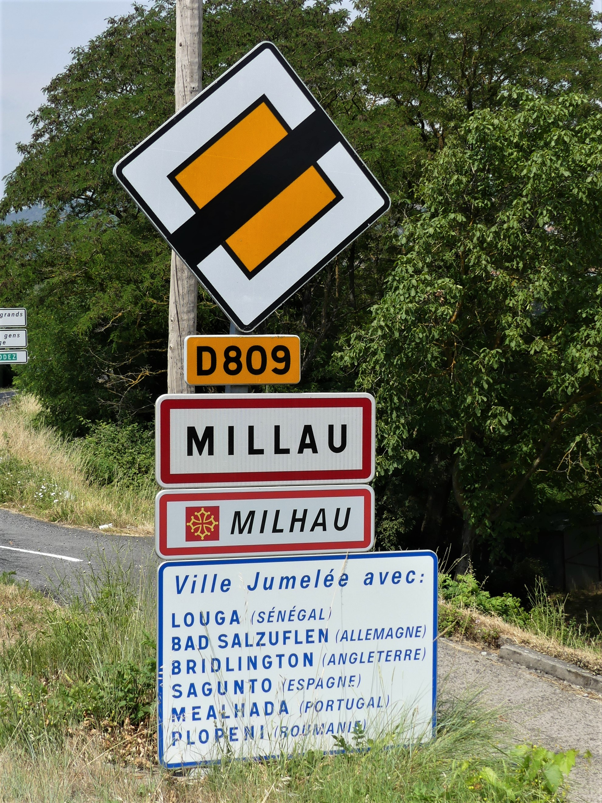 Panneau en français et en occitan d'entrée dans Millau et panneau de jumelages, Aveyron, France.